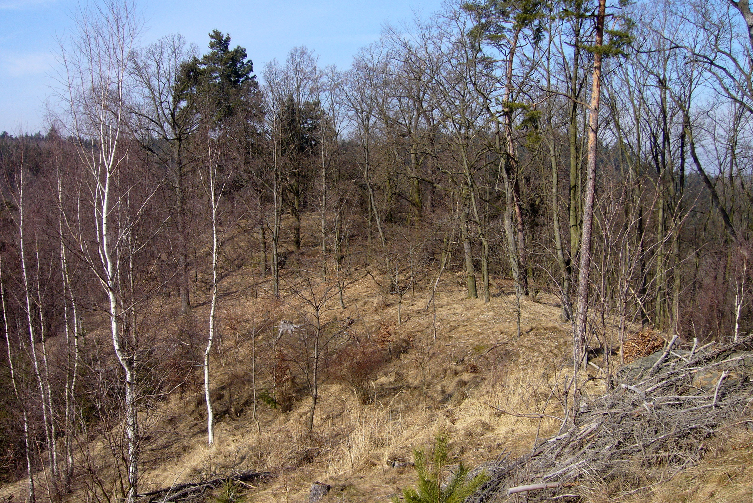 Výšinné opevněné sídliště - hradiště Starý zámek, archeologické stopy Oráčov, JZ od vsi, Oráčov